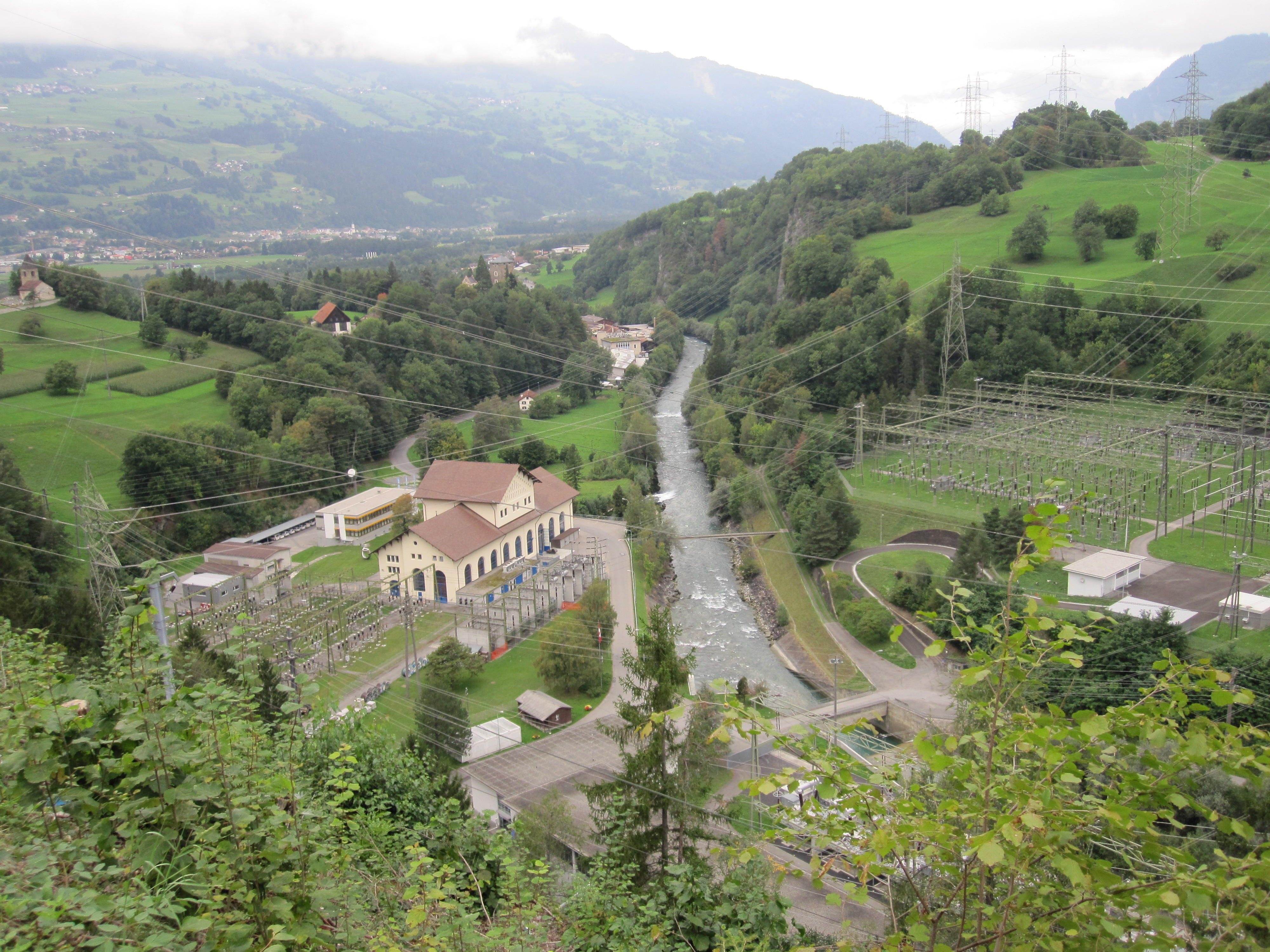 Anlage der EWZ (Elektrizitätswerke Zürich) in Sils im Domleschg (Kanton Graubünden)